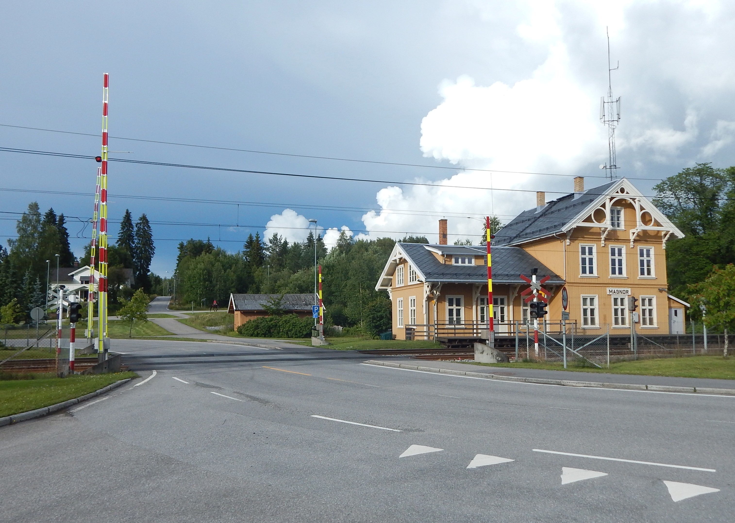 Grensevegen (fylkesvei 347) krysser Grensebanen ved Magnor stasjon.